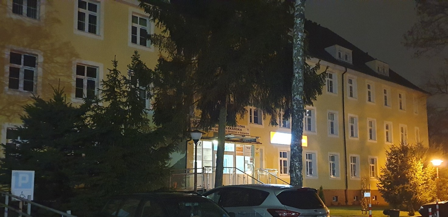 Stargard. Siedziba WSPL SP ZOZ